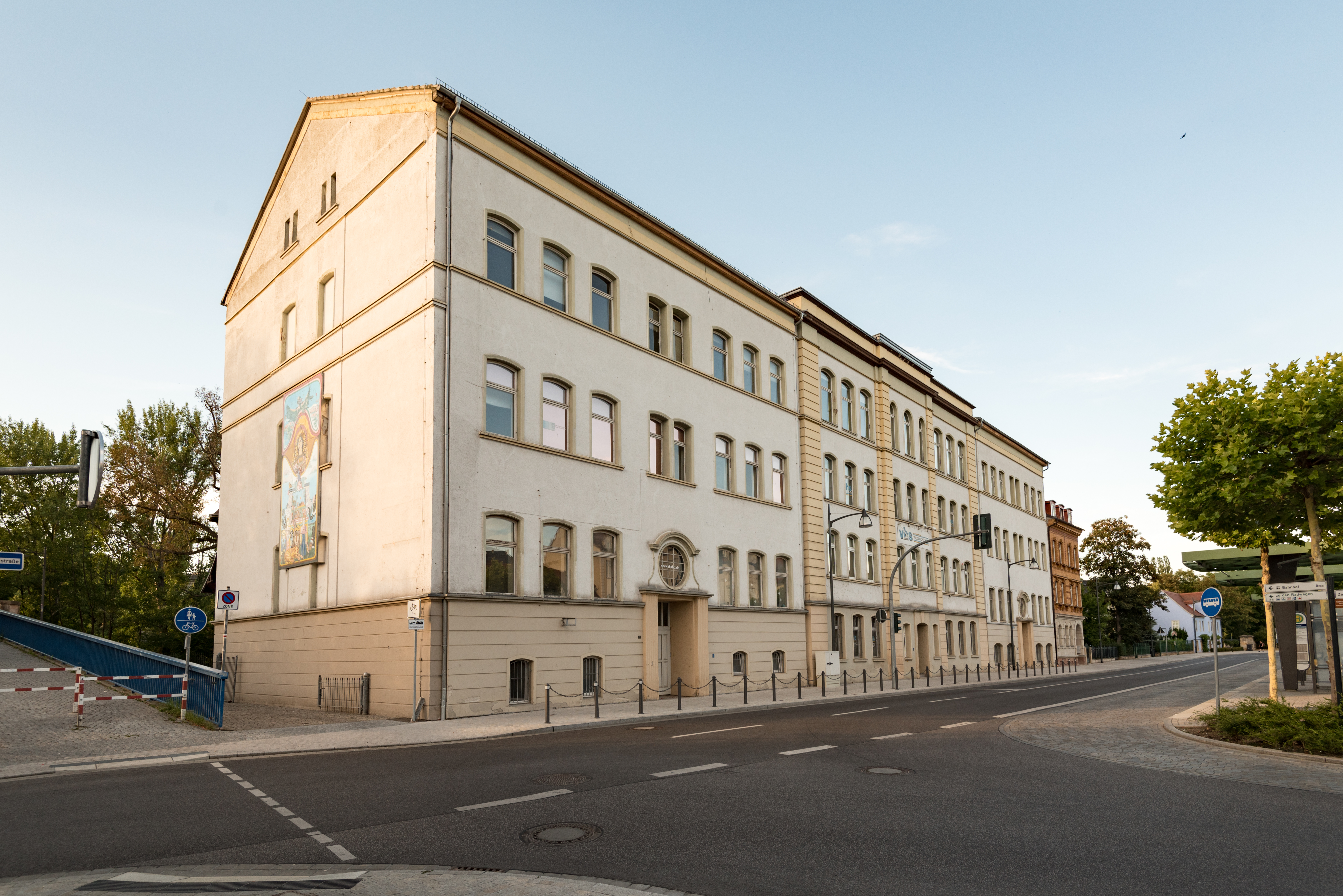 Weißenfels, Promenade 35, 37, 39